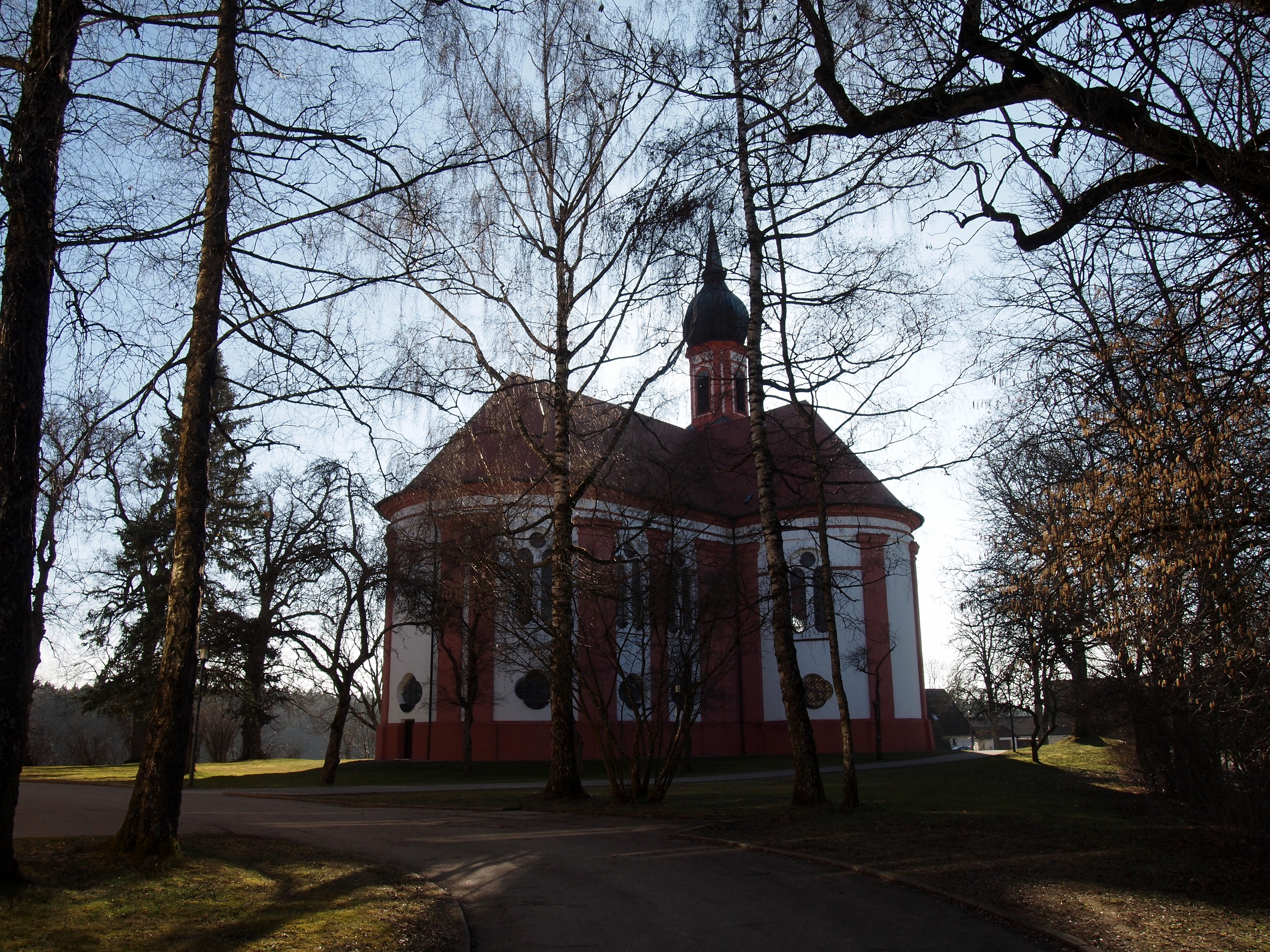 Wallfahrtskirche Mariä Schmerzen mit dreigeschossigen Priesterhaus, Gemeinde Vilgertshofen